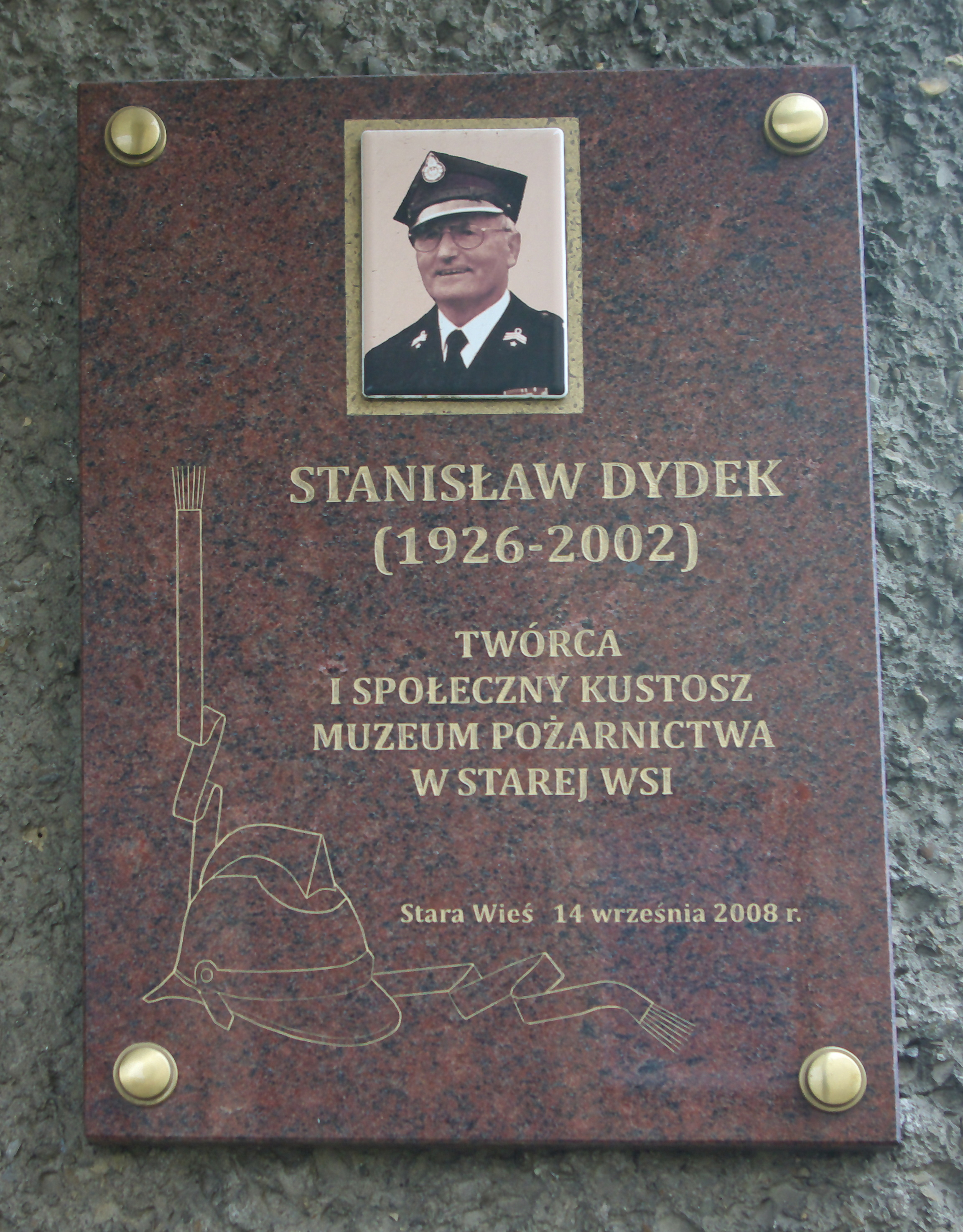 Muzeum Pożarnictwa im. Stanisława Dydka w Starej Wsi (2017). Tablica upamiętniająca Stanisława Dydka z 2008.